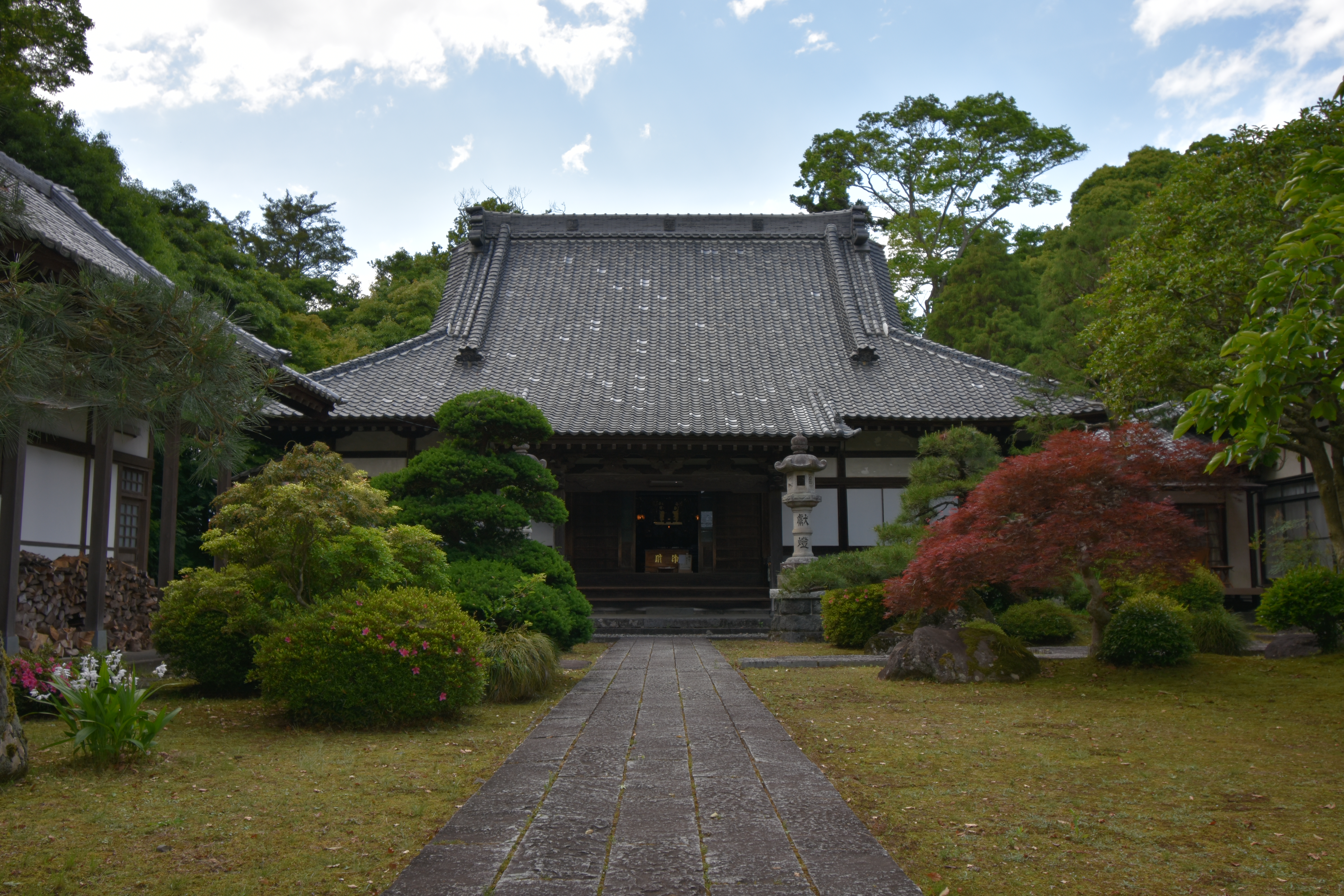 杉田安養寺の本堂、2020年5月23日撮影。